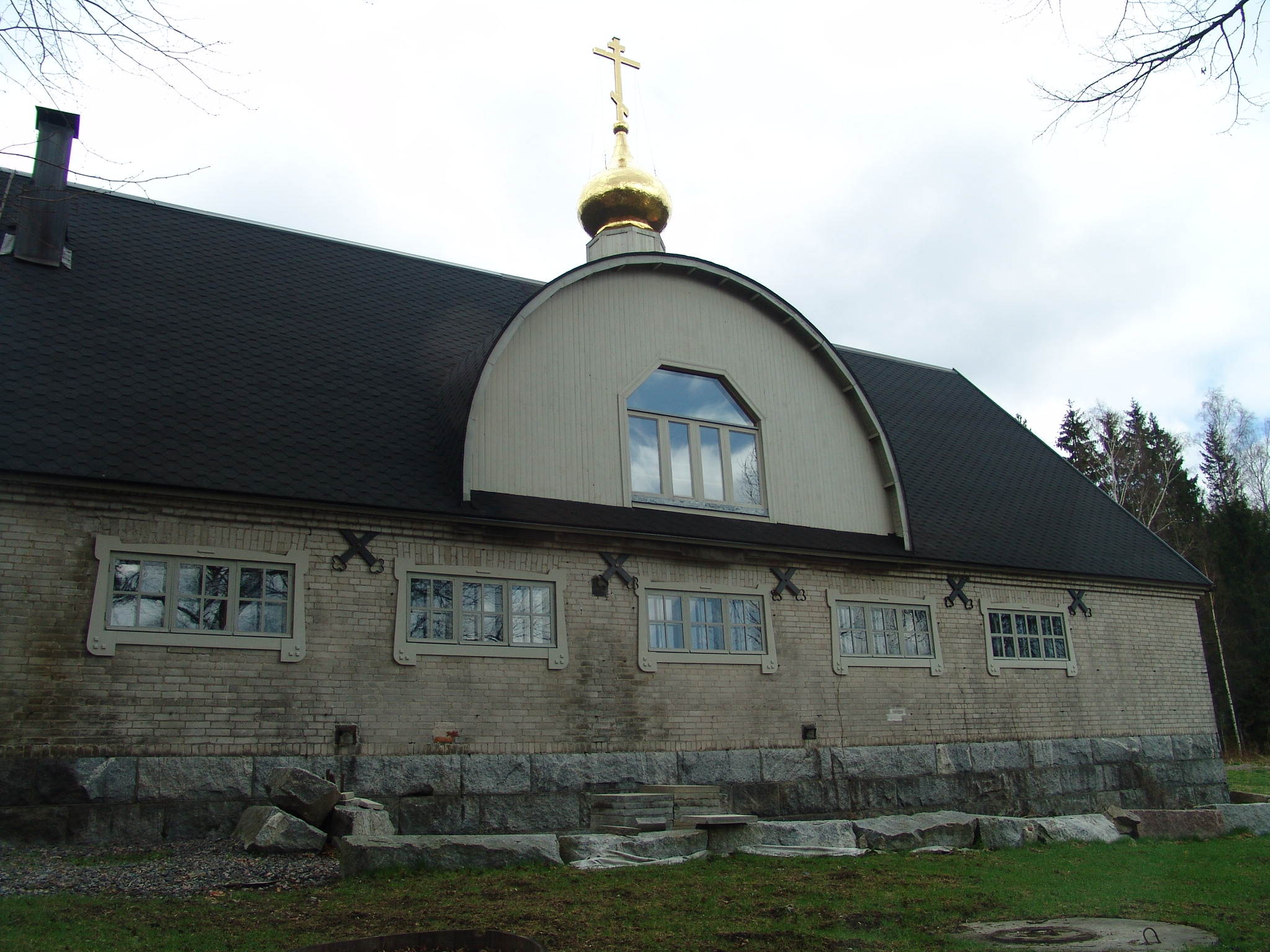 Pokrovan yhteisö